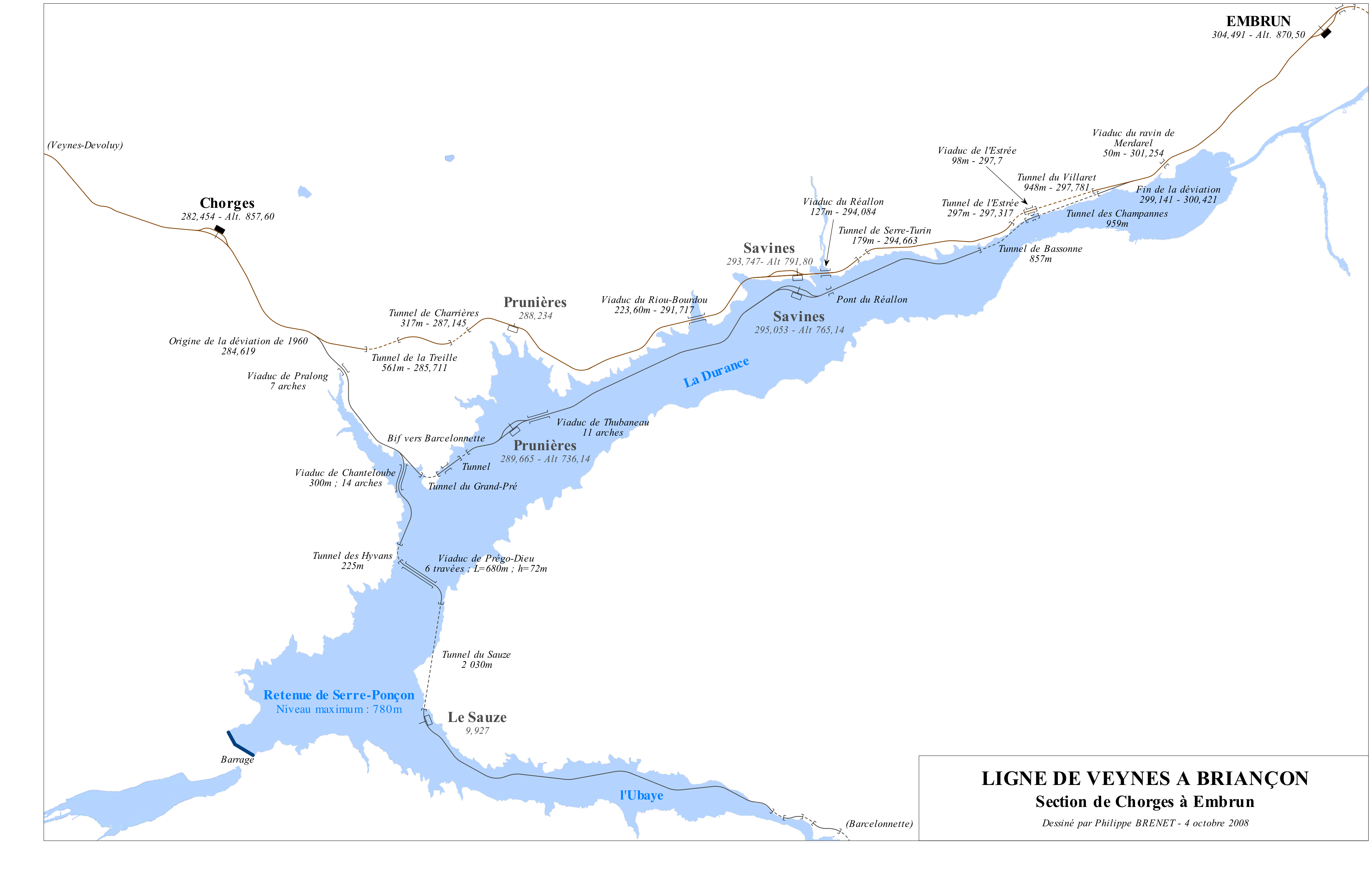 Tracé de la déviation de Serre-Ponçon (ligne Veynes - Briançon)